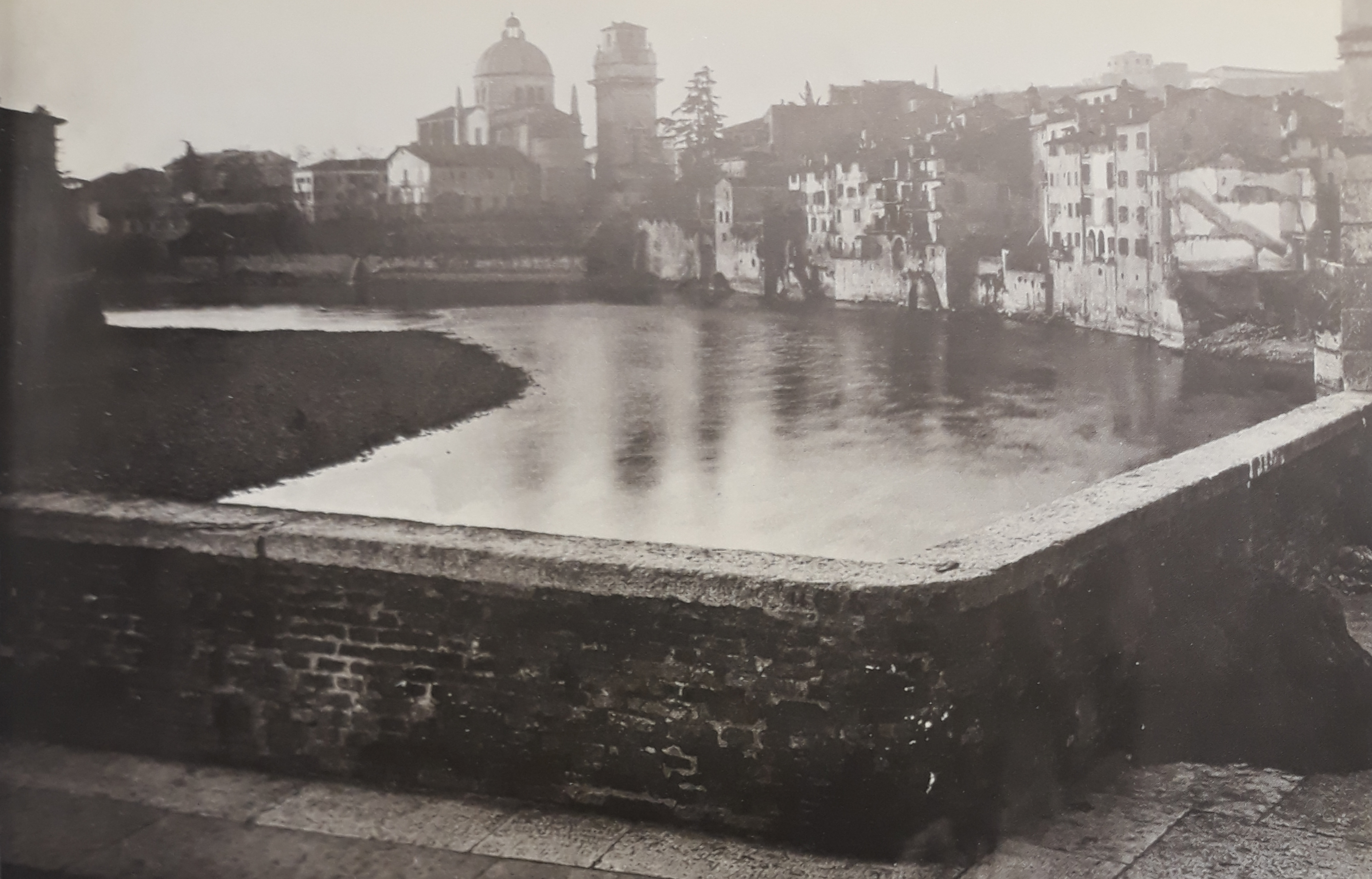 Chiesa di San Giorgio in Braida in una fotografia della fine del XIX secolo